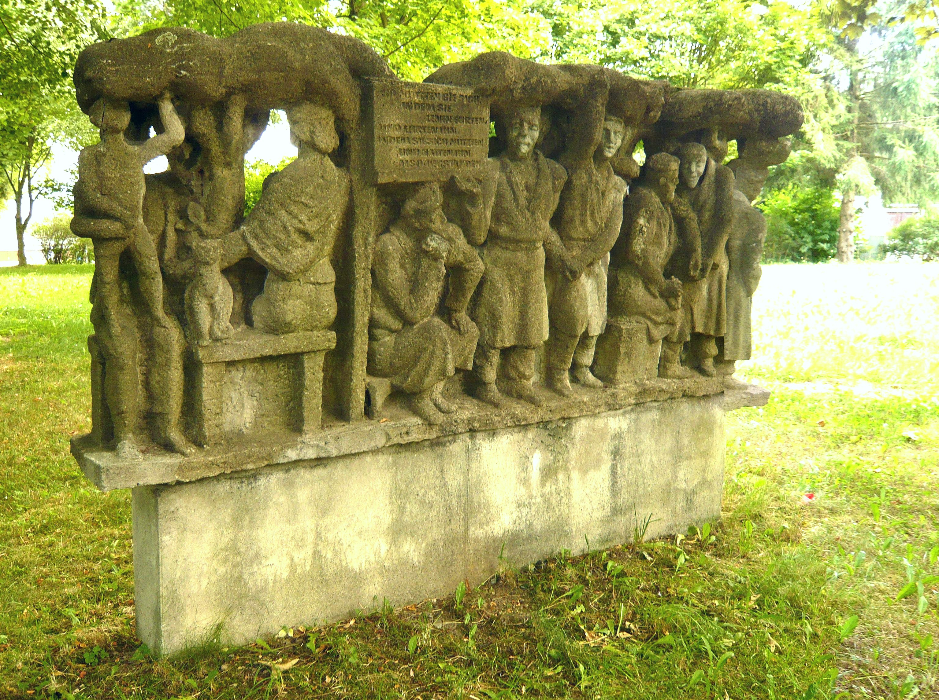 Aue (Sachsen), Denkmal auf dem Brünlasberg: "Die Teppichweber von Ulan-Ude"